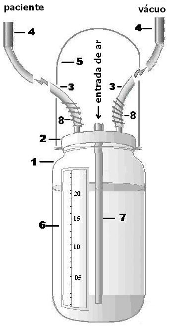 A medida de pressÃ£o negativa transmitida pelo Sistema de aspiraÃ§Ã£o contÃ­nua Ã© relacionada aos centÃ­metros de Ã¡gua em que o tubo de sifonagem reversa estÃ¡ submerso. A entrada do ar pelo tubo de sifonagem reverso equaliza a pressÃ£o na cÃ¢mara de transmissÃ£o de vÃ¡cuo de acordo com a quantidade de centÃ­metros de Ã¡gua submerso do tubo de sifonagem reverso.